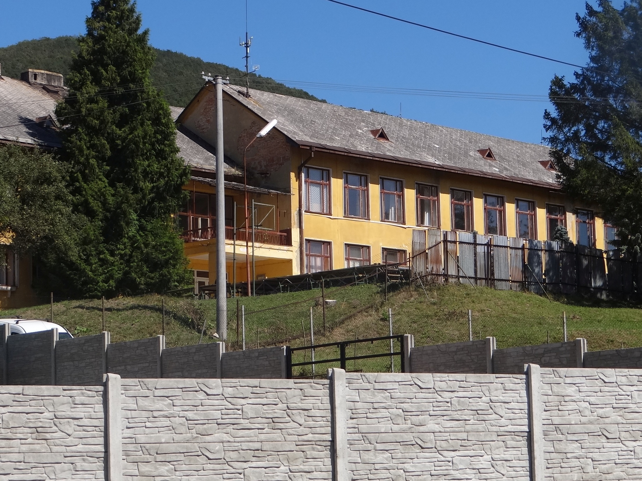 Rožňavské Bystré